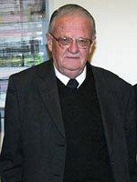 Avocat journaliste et écrivain